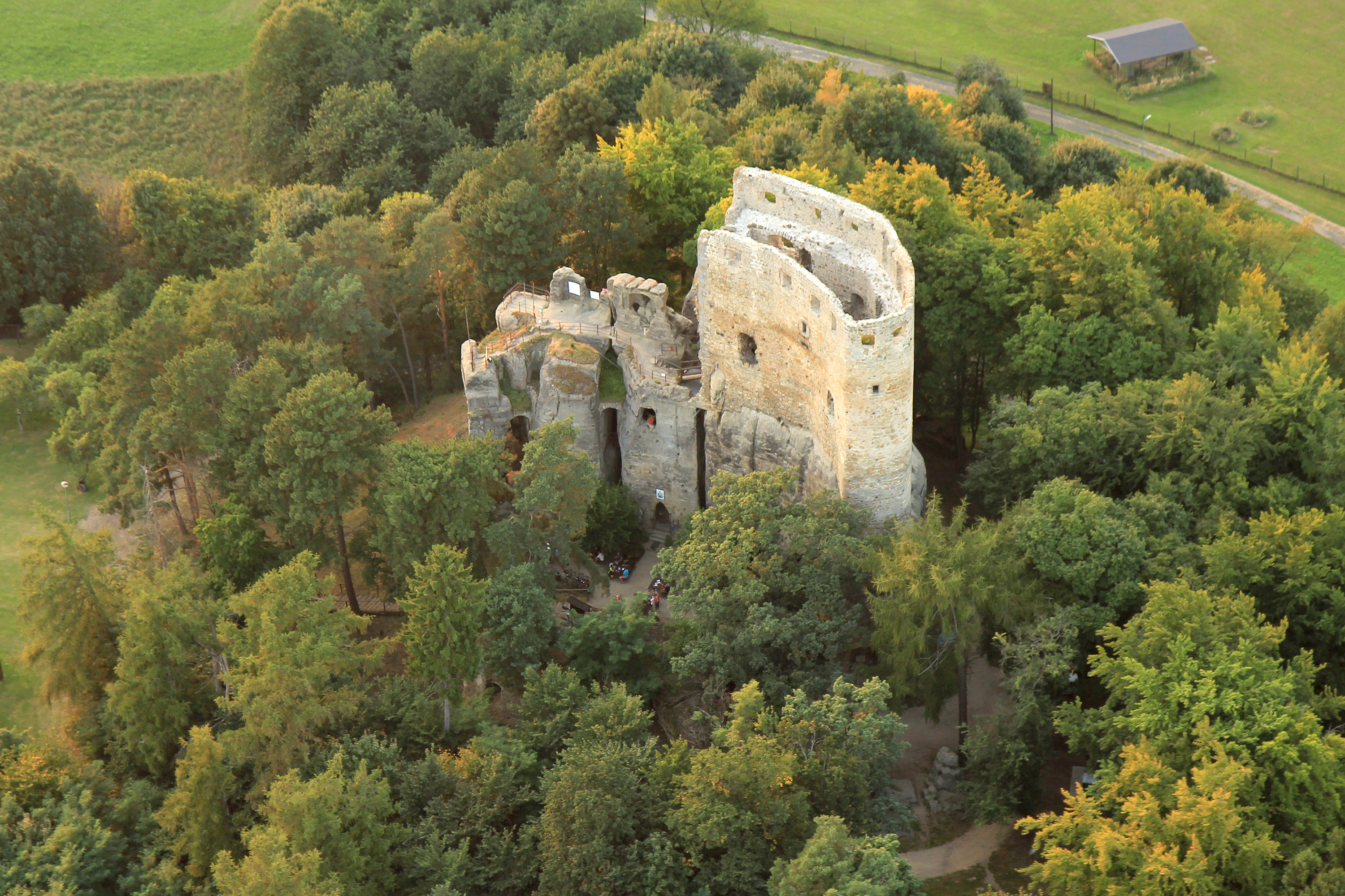 Hrad Valečov, zřícenina a archeologické stopy (Boseň), SV od Bosně, Boseň